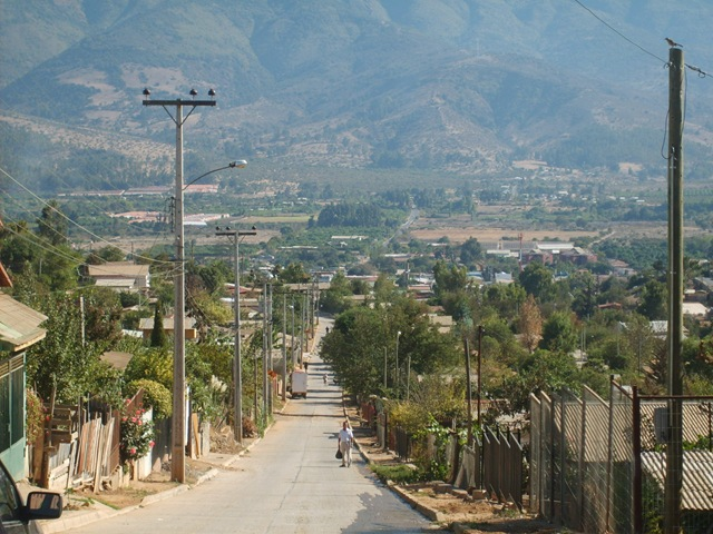 vista desde lo alto de la ligua